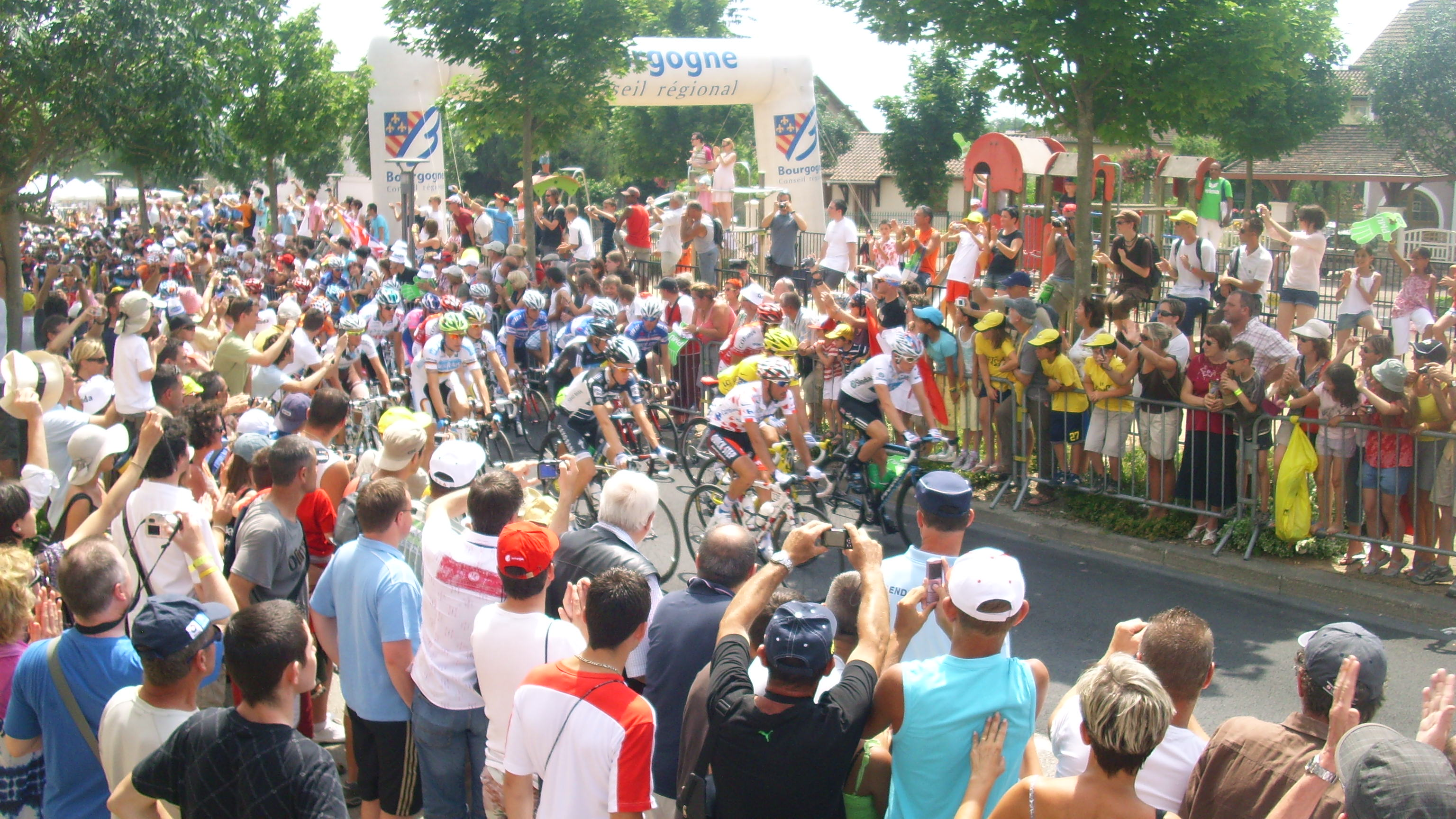 Départ du Tour de France 2010 à Tournus (Saône-et-Loire)